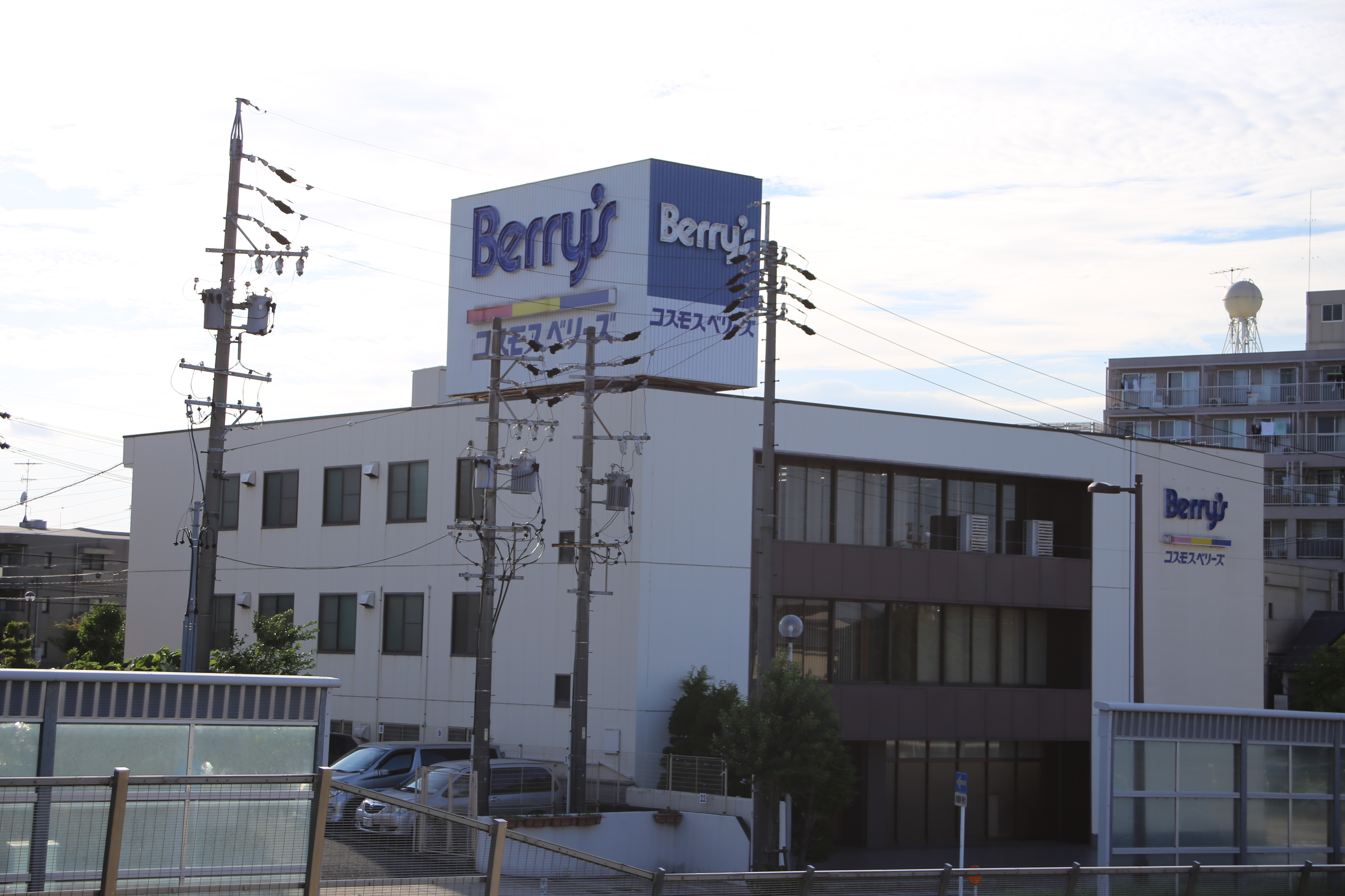 名古屋市名東区猪子石のコスモスベリーズ本社を東側公道南側より撮影